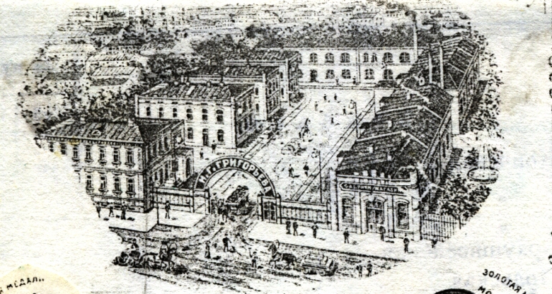 Колбасная фабрика Н.Г.Григорьева в Кадашевской слободе Sausage factory of Nikolai Grigoriev in Kadashevskaya Quarter, Moscow